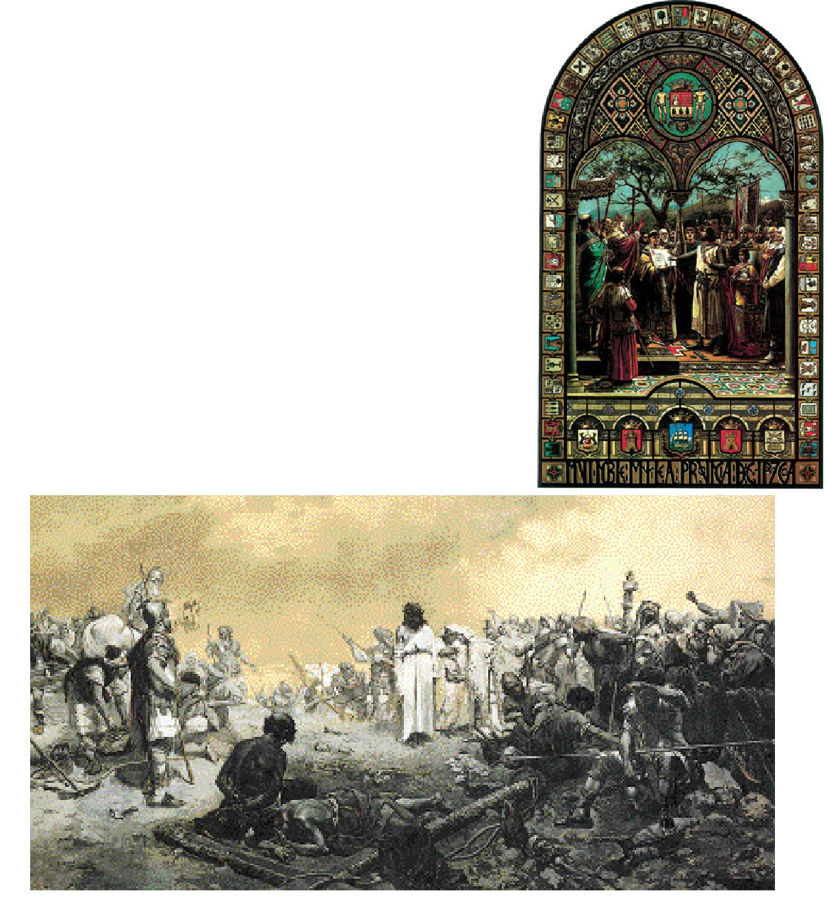 Behean: “Sansón y Dalila”, José Echenagusiaren lana. Goian: “Jura de los Fueros guipuzcoanos por Alfonso VIII de Castilla, el año 1200”, egile berarena.